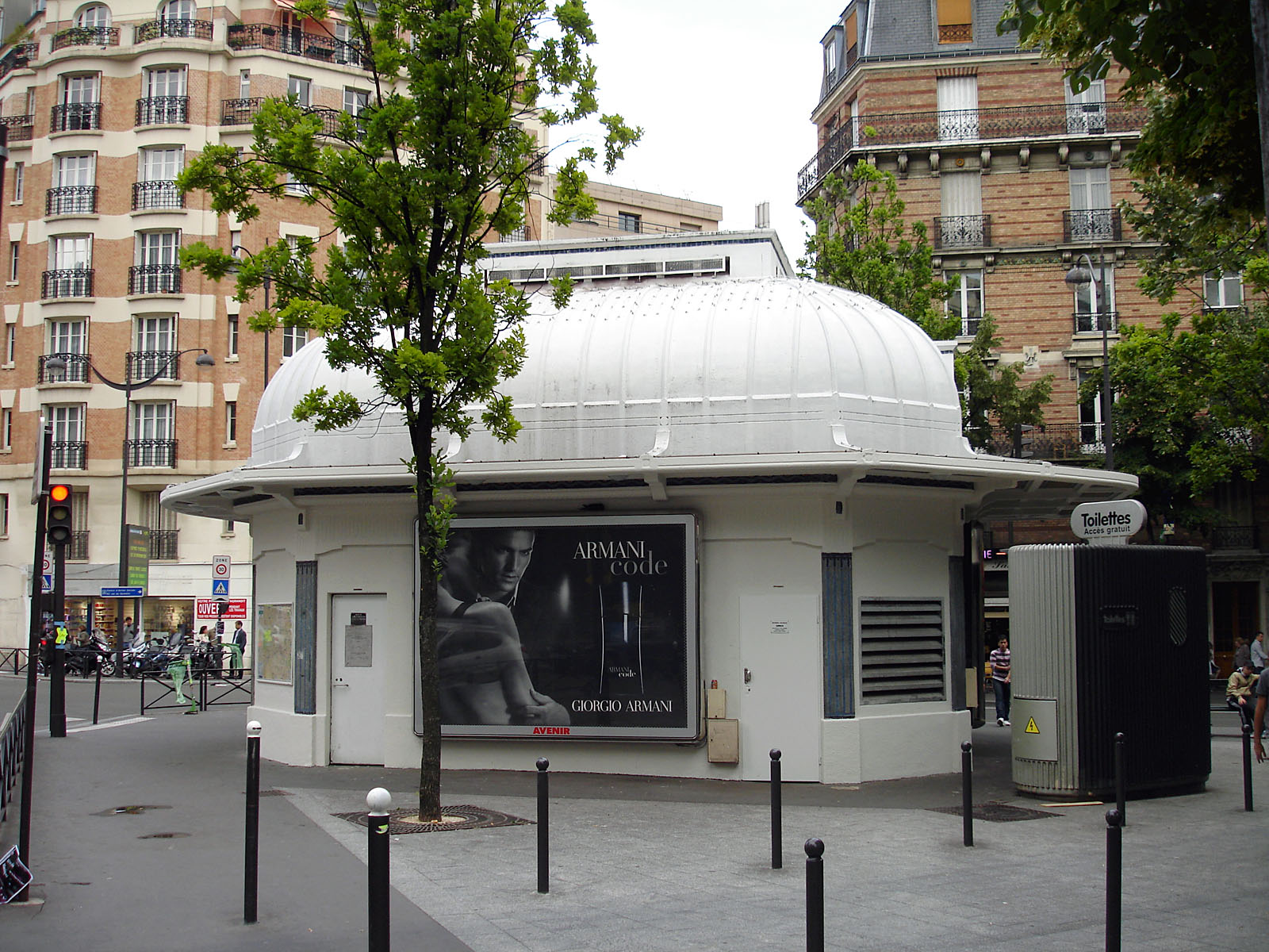 Édicule de la station Saint-Fargeau de la ligne 3 bis du métro de Paris, France.